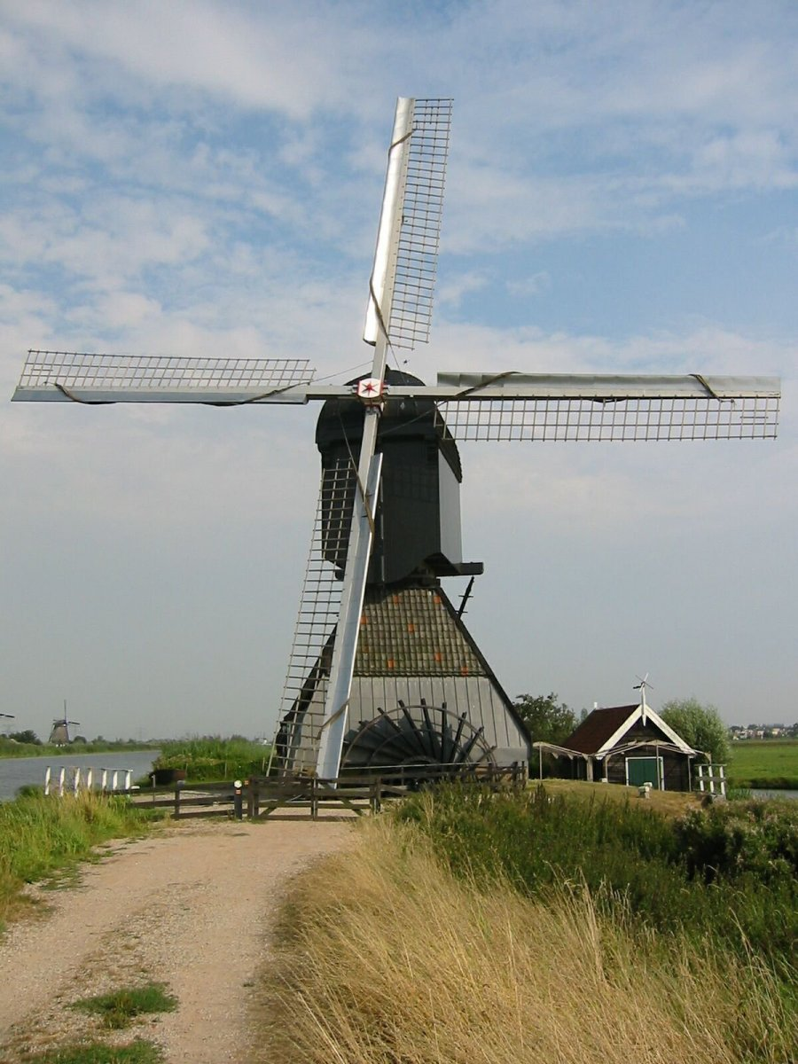 De Blokker/ Blokweerse Molen: Wipmolen te Kinderdijk van voren gefotografeerd (opmerking: Foto gemaakt in het kader van het project Actualisering Monumentenregister (AMR).)